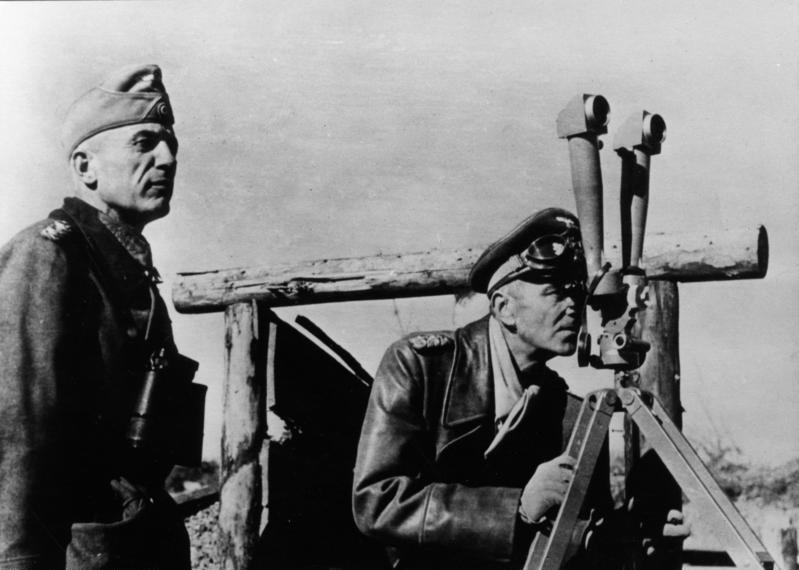 Der Oberbefehlshaber einer Armee, Ritterkreuzträger General der Panzertruppe Paulus (rechts) auf einer B-Stelle im nördlichen Abschnitt Stalingrads.